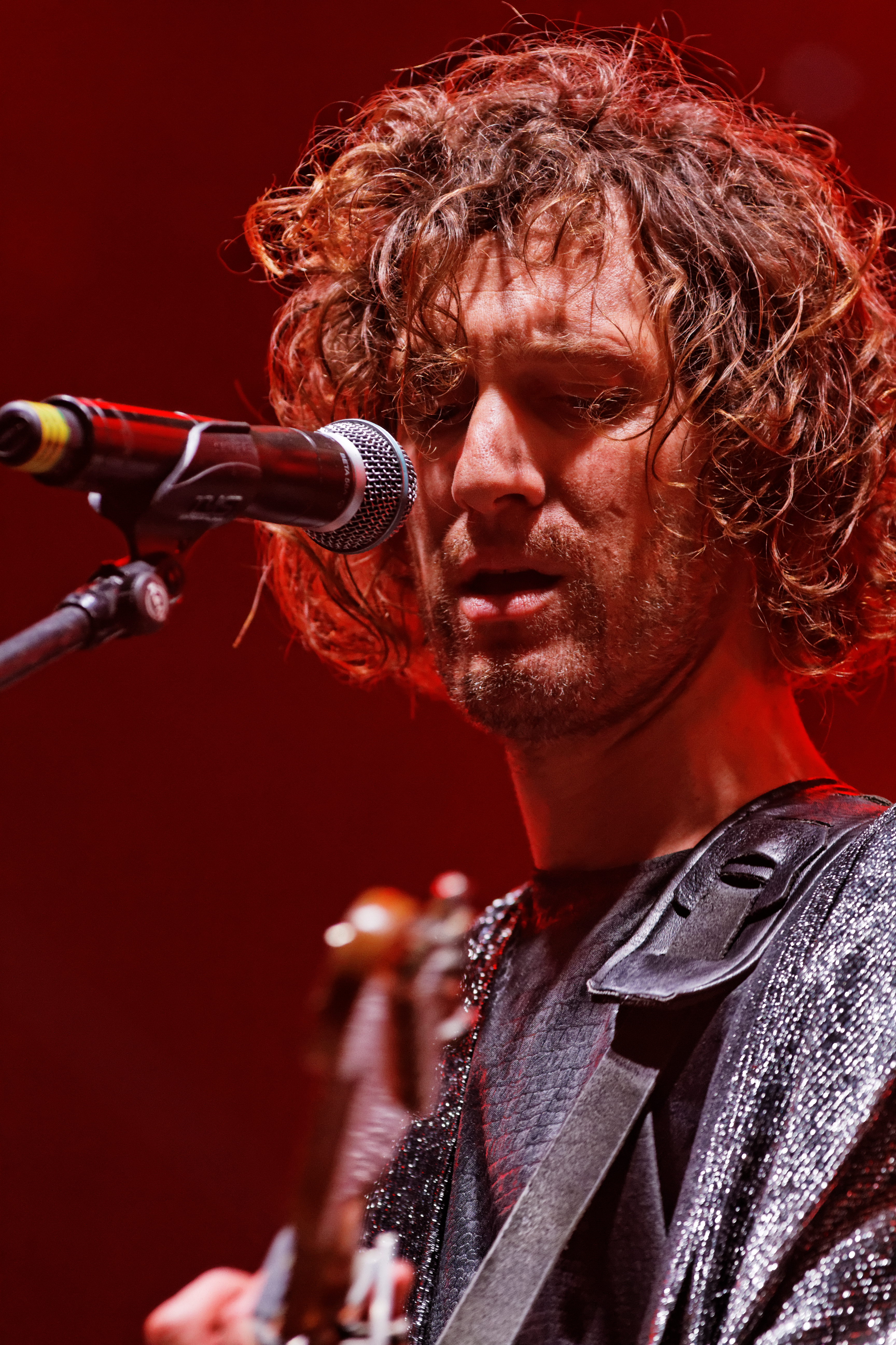 Florent Marchet en concert sur la scène Zebrock lors de la fête de l'Humanité 2014.